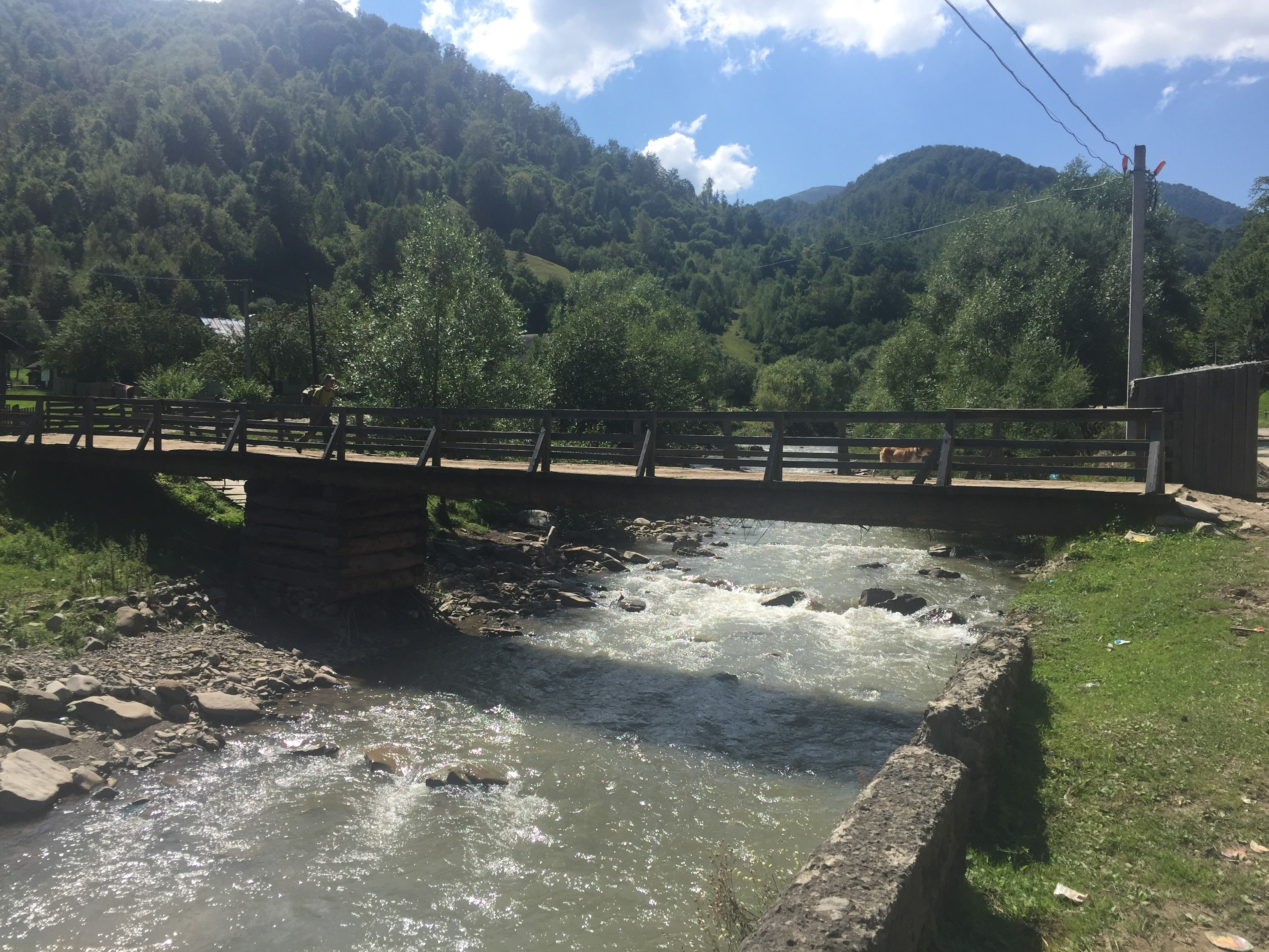 Міст через річку Мокрянка